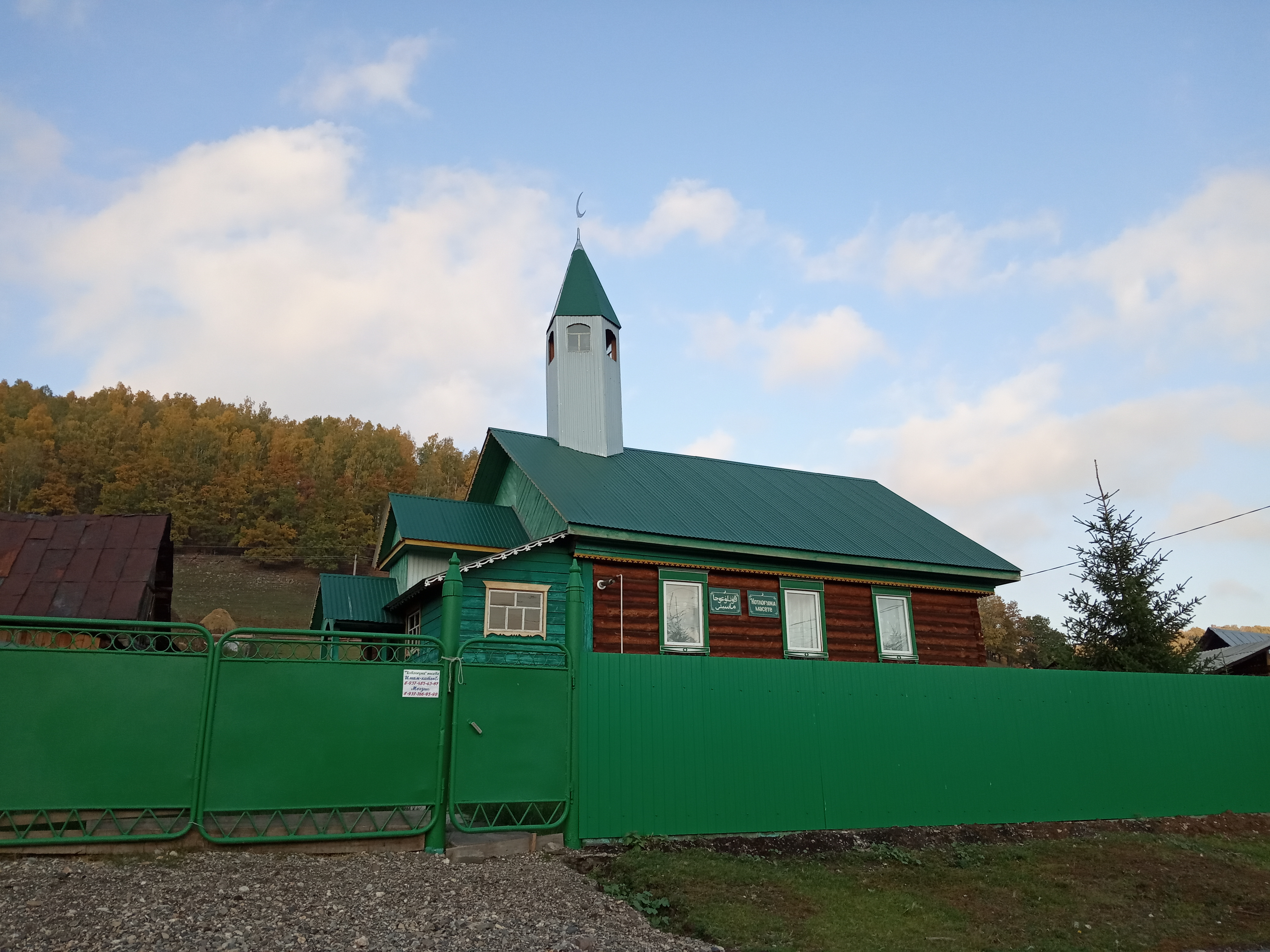 Бурзянский район, дер.Старомусятово